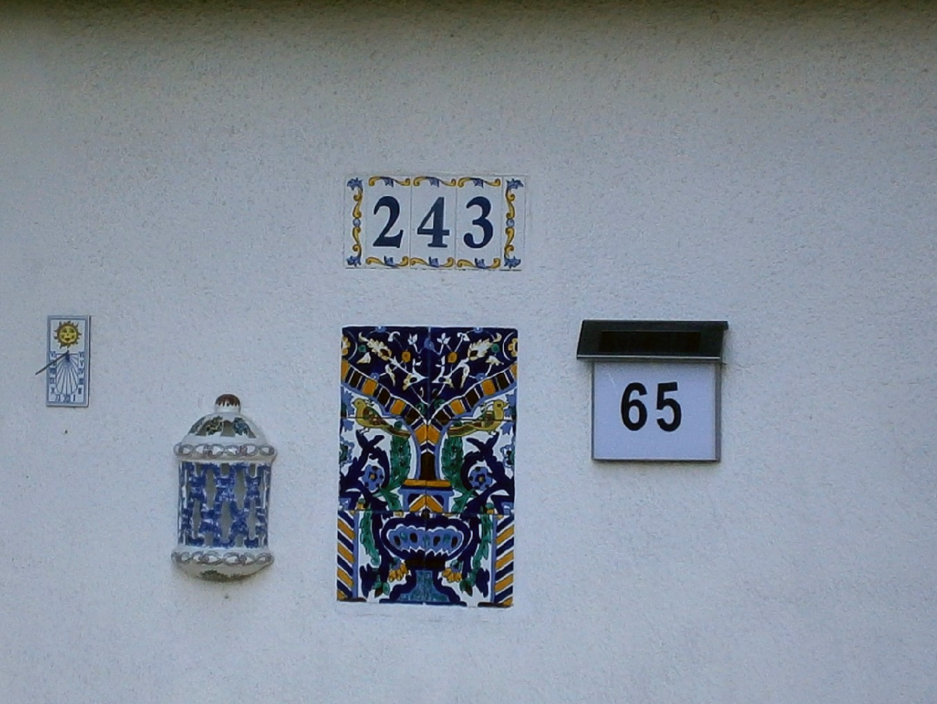 Waldeckkarree ist eine gewidmete Privatstraße in Berlin-Blankenfelde, in der Siedlung Schildow-Waldeck. Hier ein Beispiel für die durch die Benennung von Straßen notwendige Umnummerierung der Grundstücke.